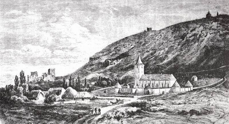 Orbán Balázs fotográfiája erről a vidékről az 1868-ban kiadott monumentális A Székelyföld leírása III.kötetében a 112. oldalon